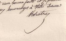 Signature de Auguste Hilaron de Keratry sur Lettre Autographe